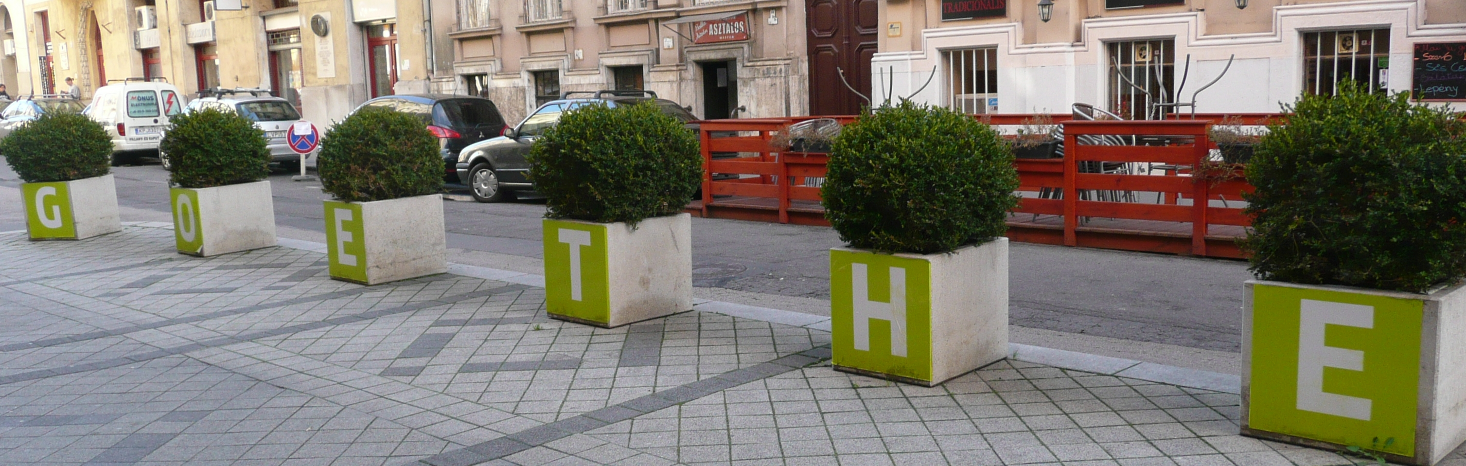 A Budapesti Goethe Intézet bejáratával szembeni növények (1092, Budapest, IX. kerület, Ráday utca 58.)